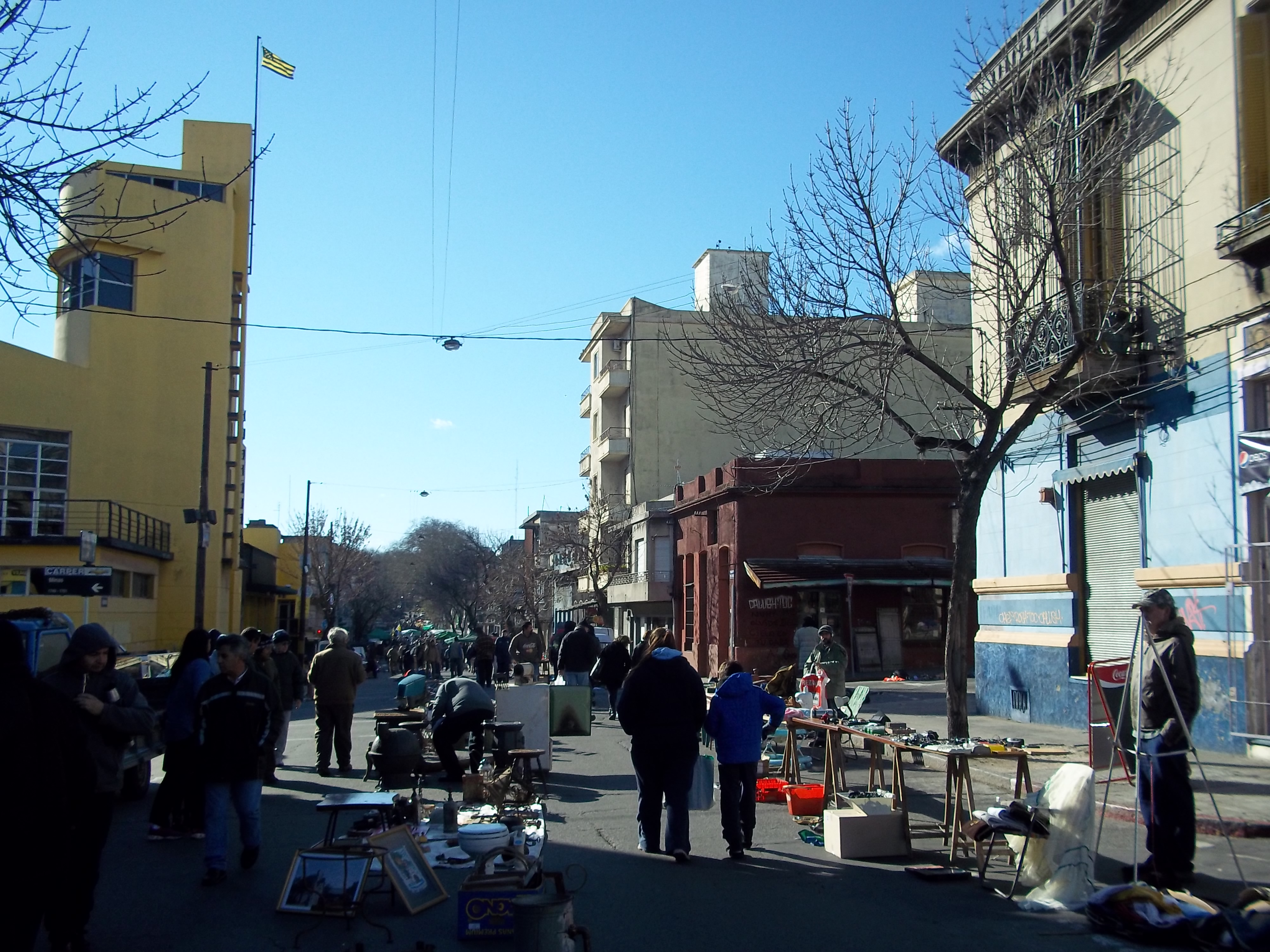 Feria de Tristán Narvaja, en la intersección de las calles Cerro Largo y Minas, justo frente al Palacio Peñarol, en Montevideo, Uruguay.